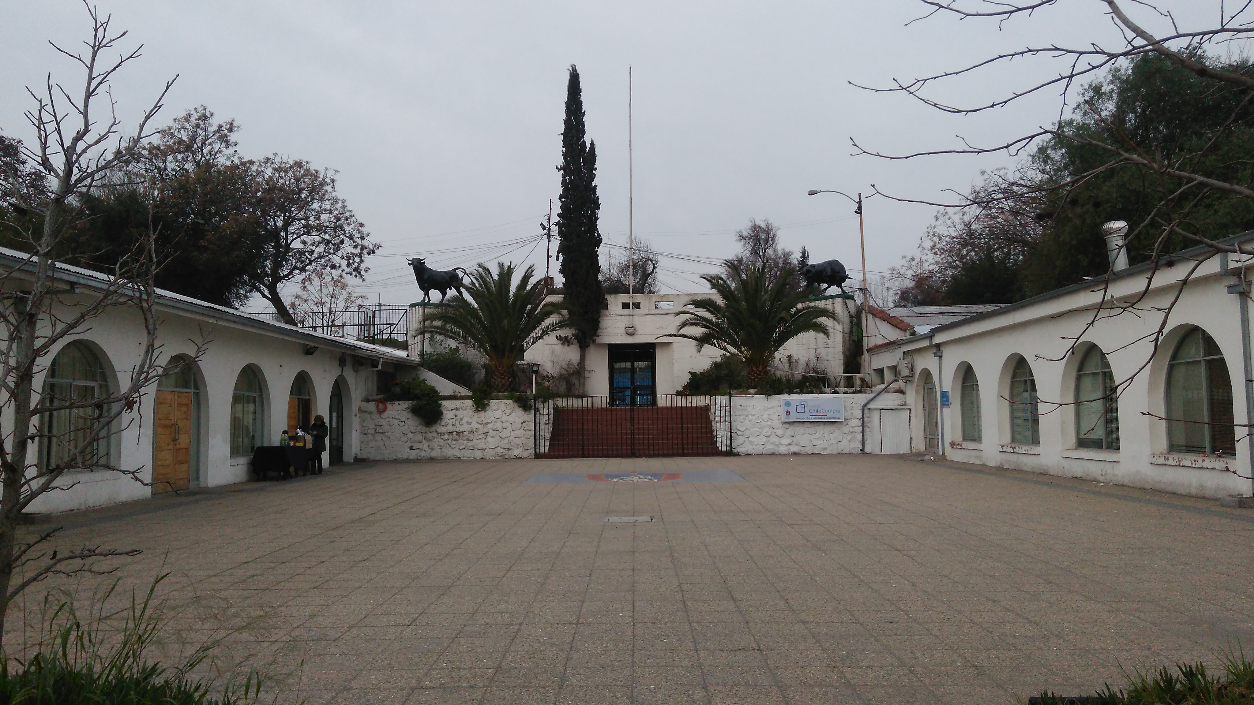 El acceso de la Plaza de Toros de Maipú, inaugurada en abril de 1940 como "Medialuna Municipal de Maipú" por el entonces alcalde José Miguel Infante Larraín.